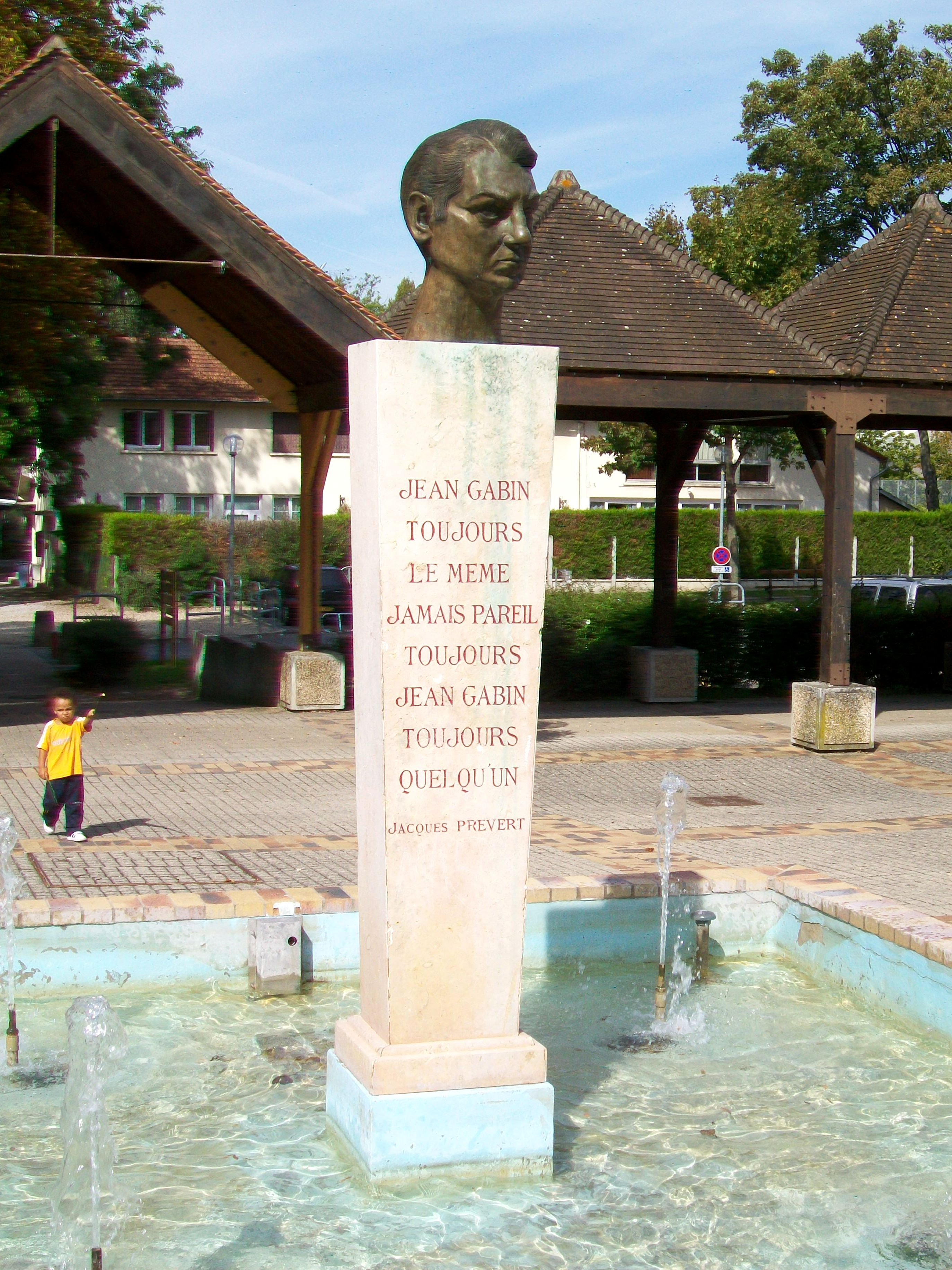 Monument pour Jean Gabin sur la place entre le musée Jean-Gabin et l'Office de tourisme, Grande rue.